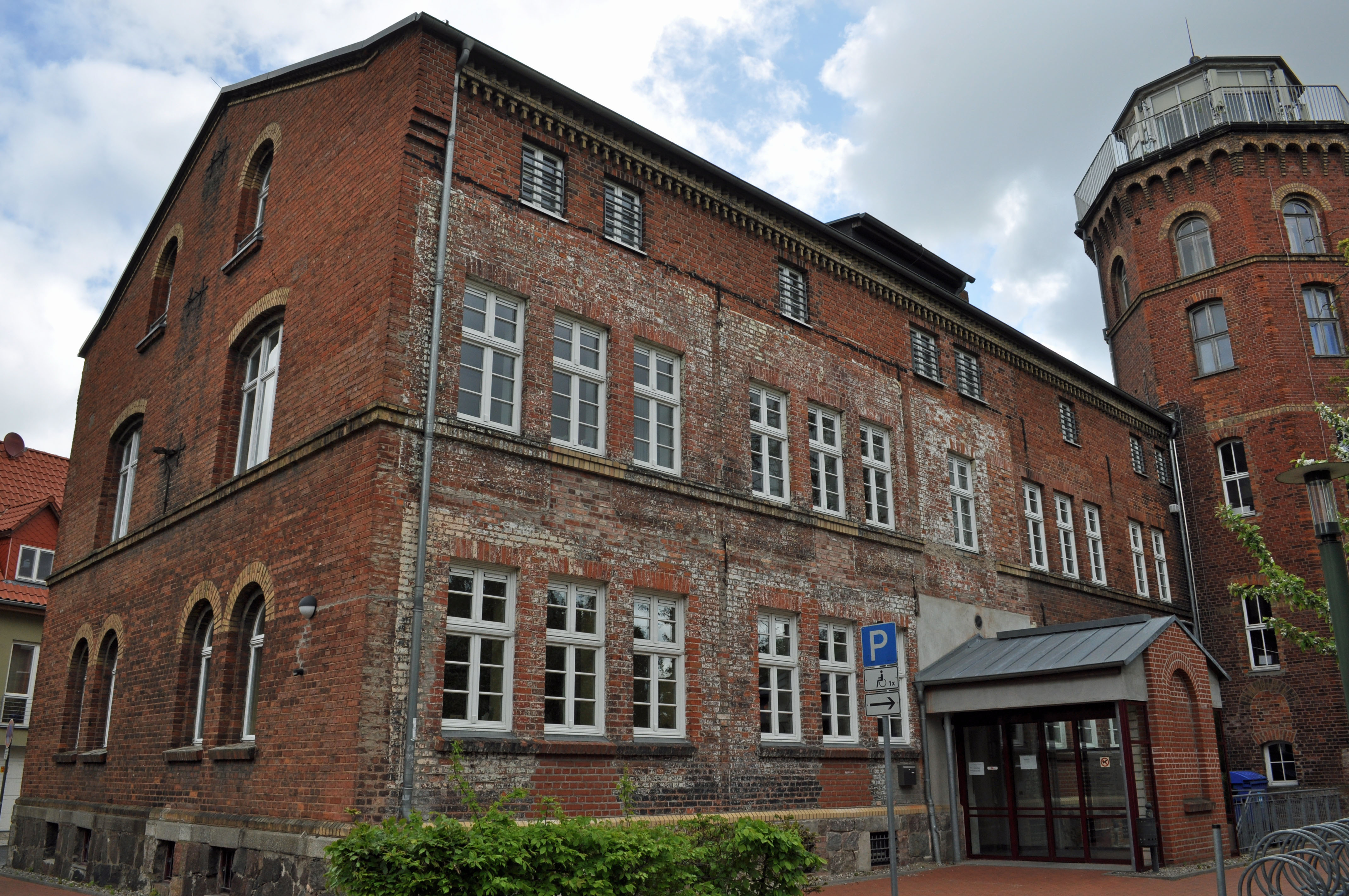 Gebäude in Stralsund, siehe Dateiname